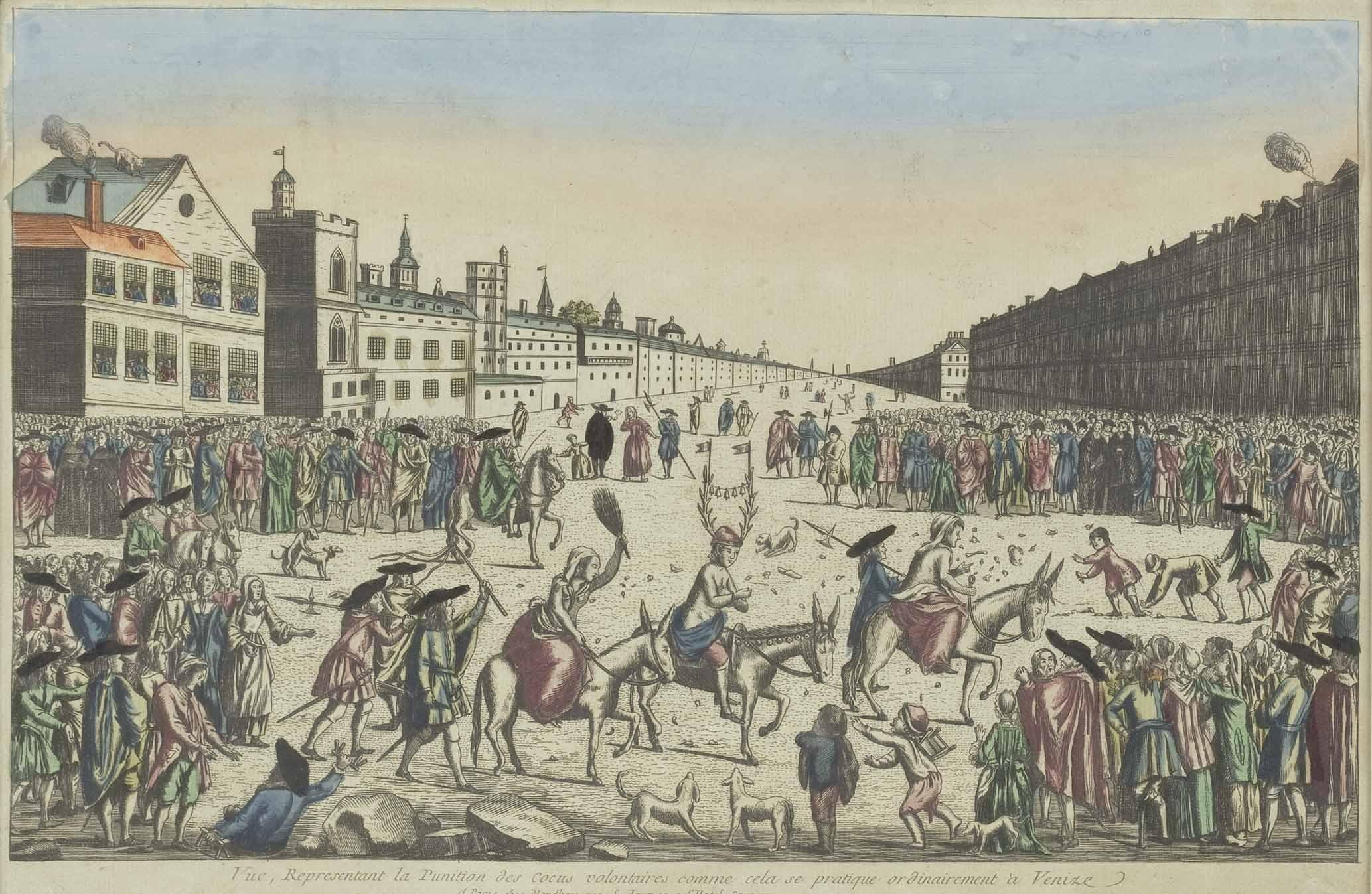 Vue, Representant la Punition des cocus volontaires comme cela se pratique ordinairement a Venize (Spottjustiz gegen ehebrecherische Frauen in Venedig) ca. 26 x 42 cm; Radierung, Paris, 2. Hälfte 17. Jhdt.